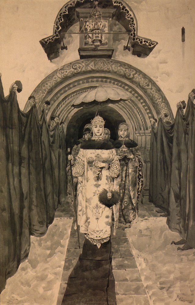 выход царицы Марии Ильиничны из церкви. 1893. Государственная Третьяковская галерея, Москва